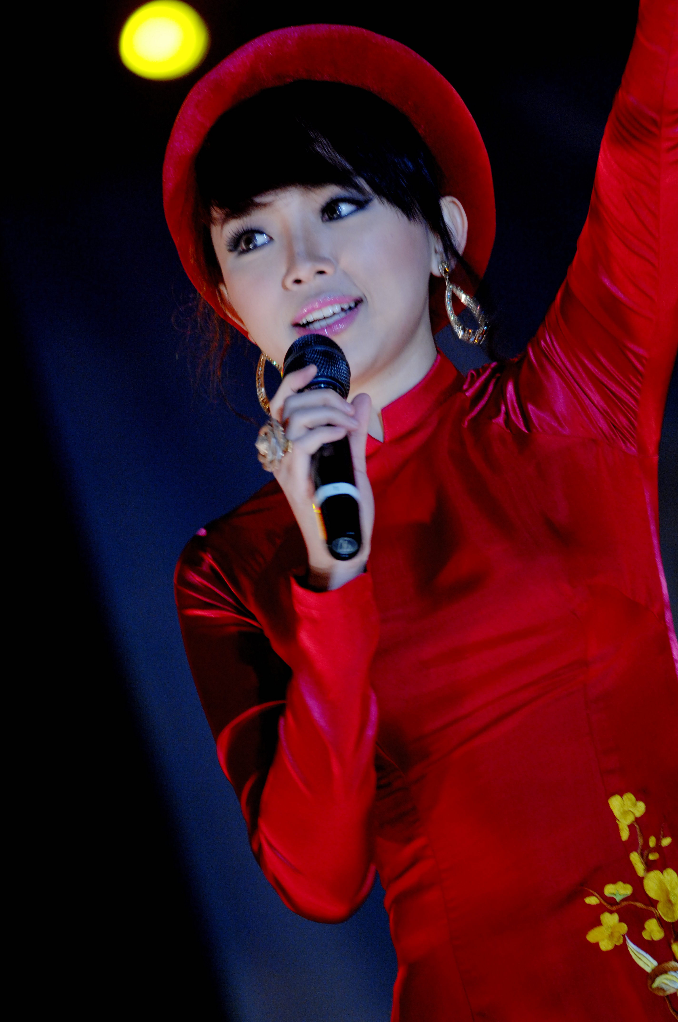 Vietnamese vocalist Tóc Tiên